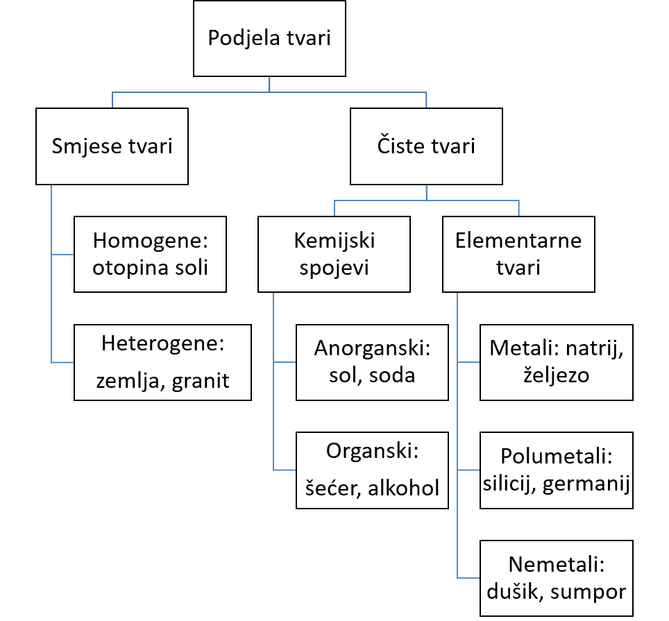 Kinds of substances